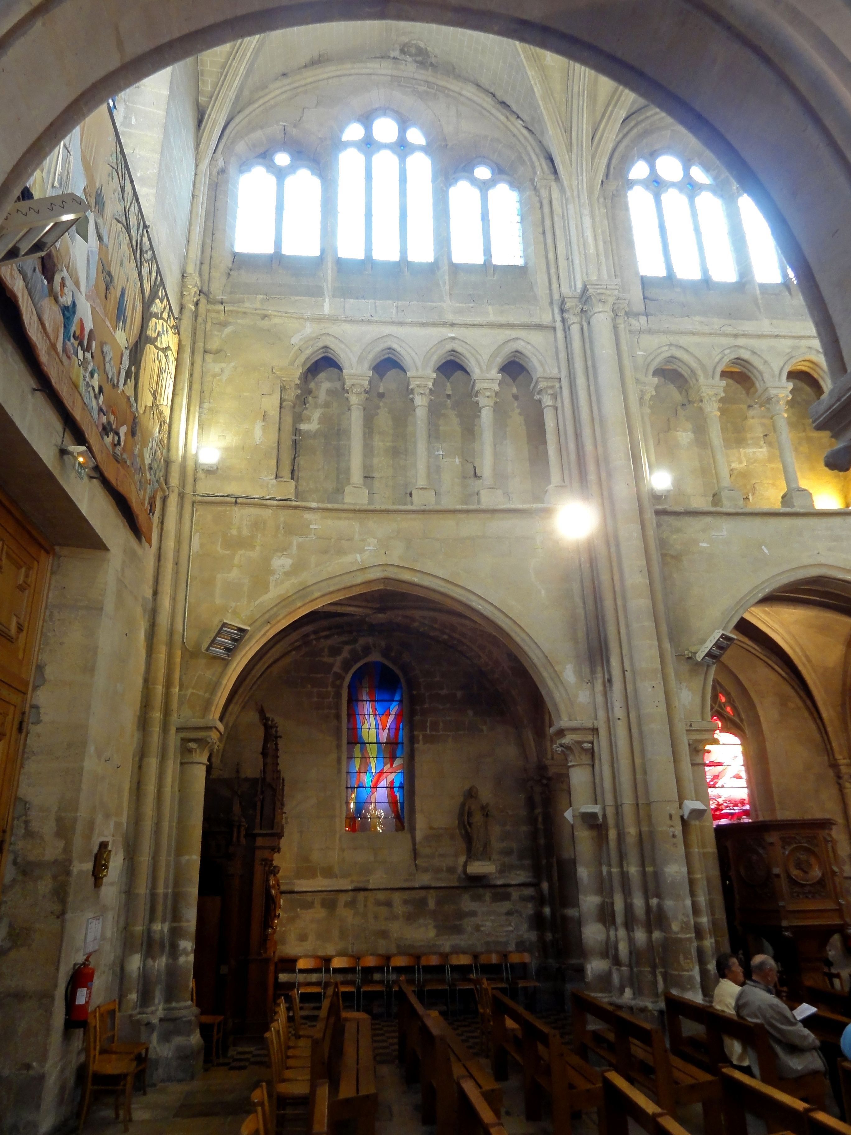 Elévation nord, 1ère travée.